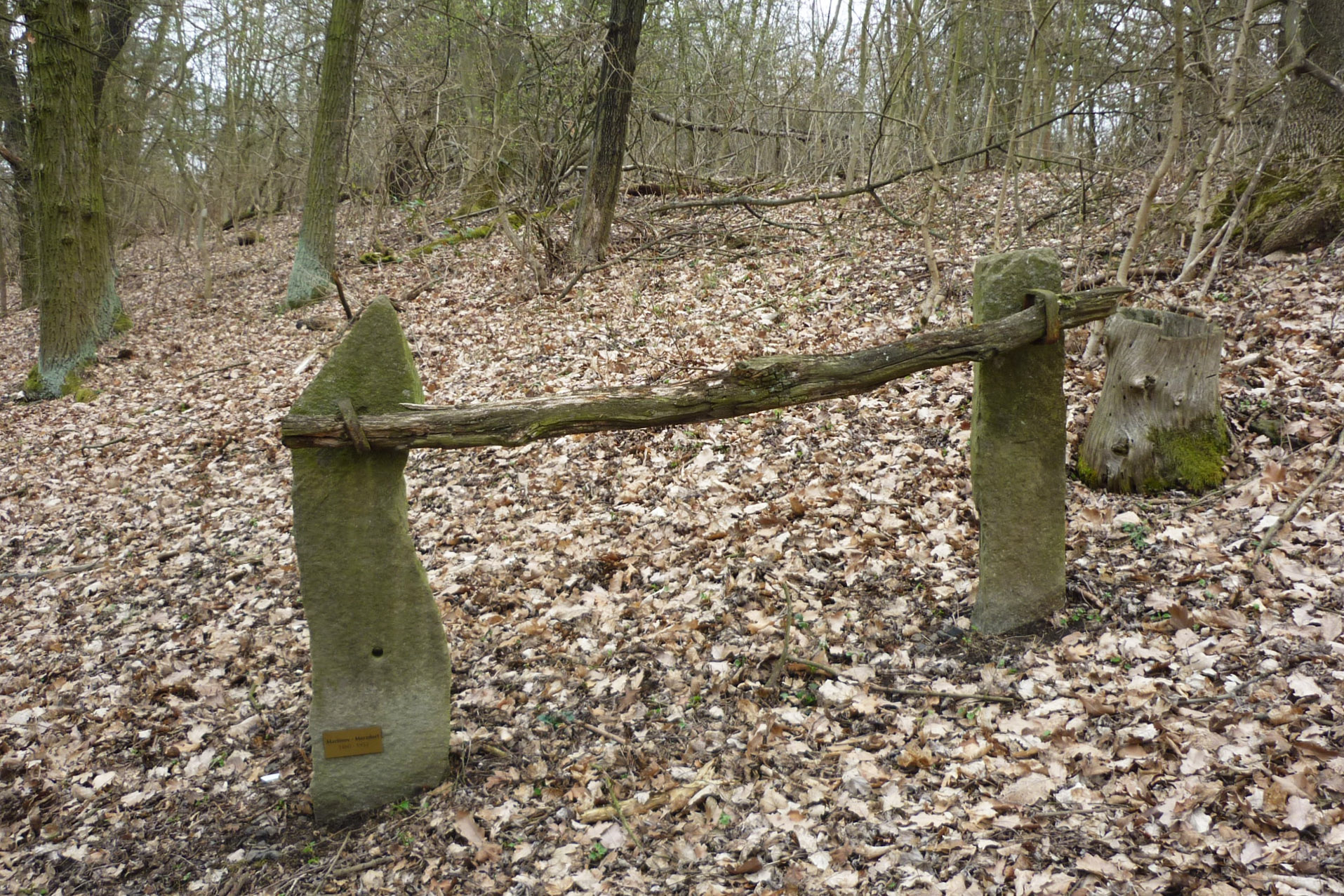 Lapidarium der zerstörten Orte im Duppauer Gebirge auf dem Winteritzer Kapellenberg: Zaunsäulen aus Martinov – Merzdorf (1460-1953)